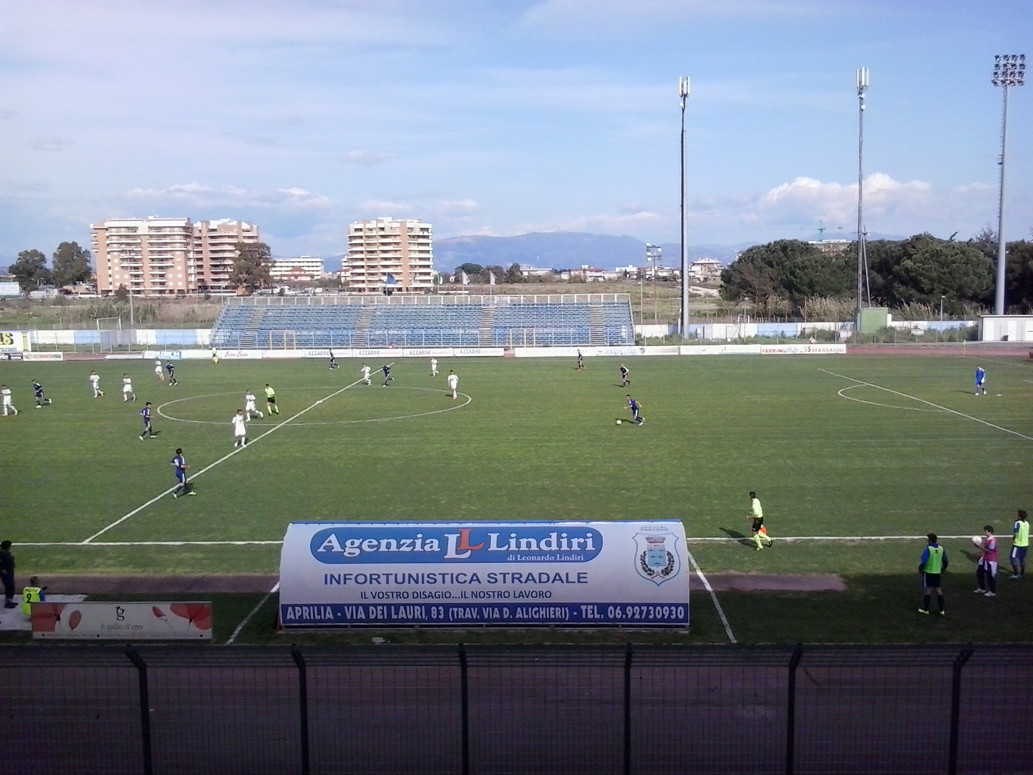 Calcio